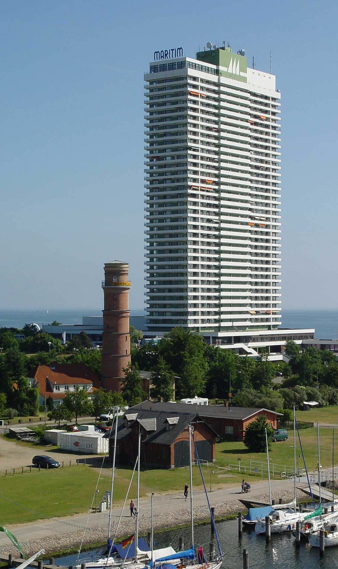 Alter Travemünder Leuchtturm und Hotel Maritim, das jetzt das Leuchtfeuer in 117 m über N.N trägt